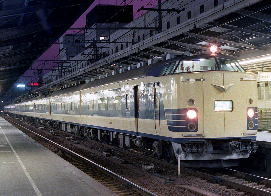 国鉄 583系特急形電車 特急「雷鳥」